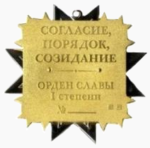 Рисунок реверса ордена Славы (Мордовия) I степени опубликованный в законодательном акте